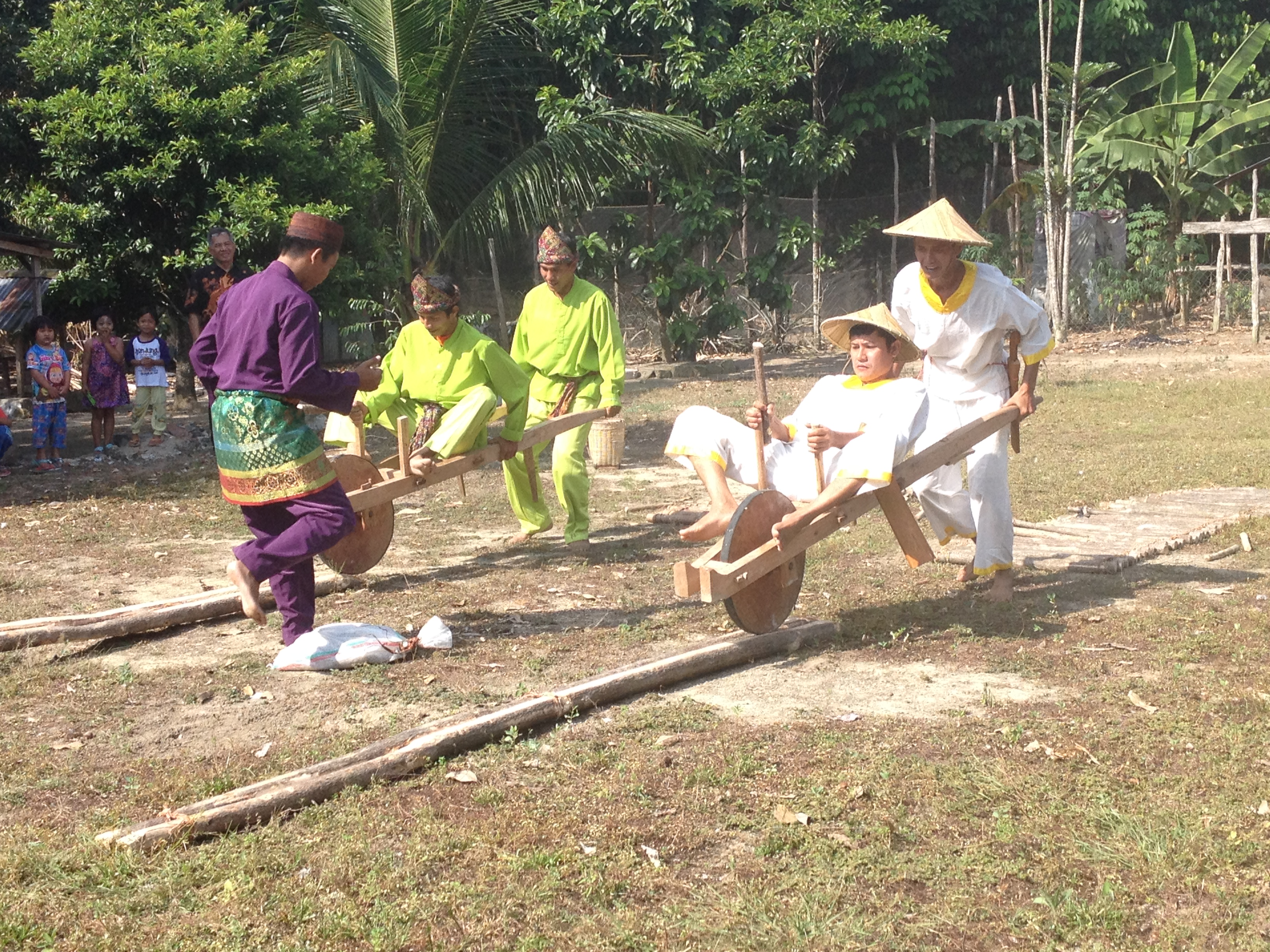 Permainan tradisional Adu Kerito Surong